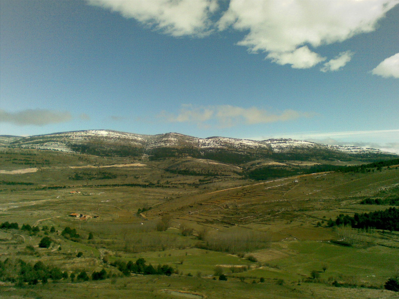 Sierra de Mayabona (Puertomingalvo, Teruel, Aragón)